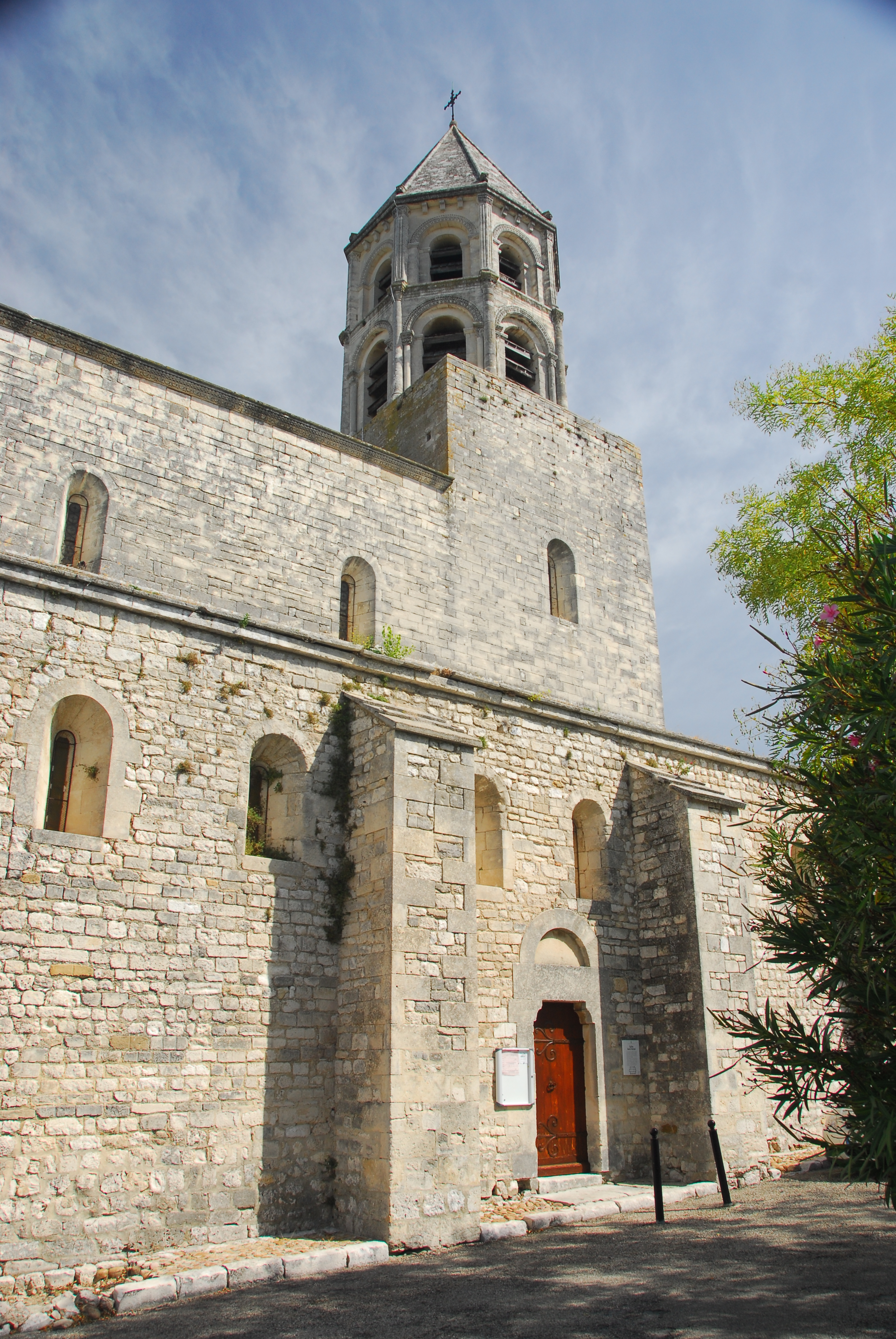 St-Michel de La Garde- Adhémar. von Süd-West